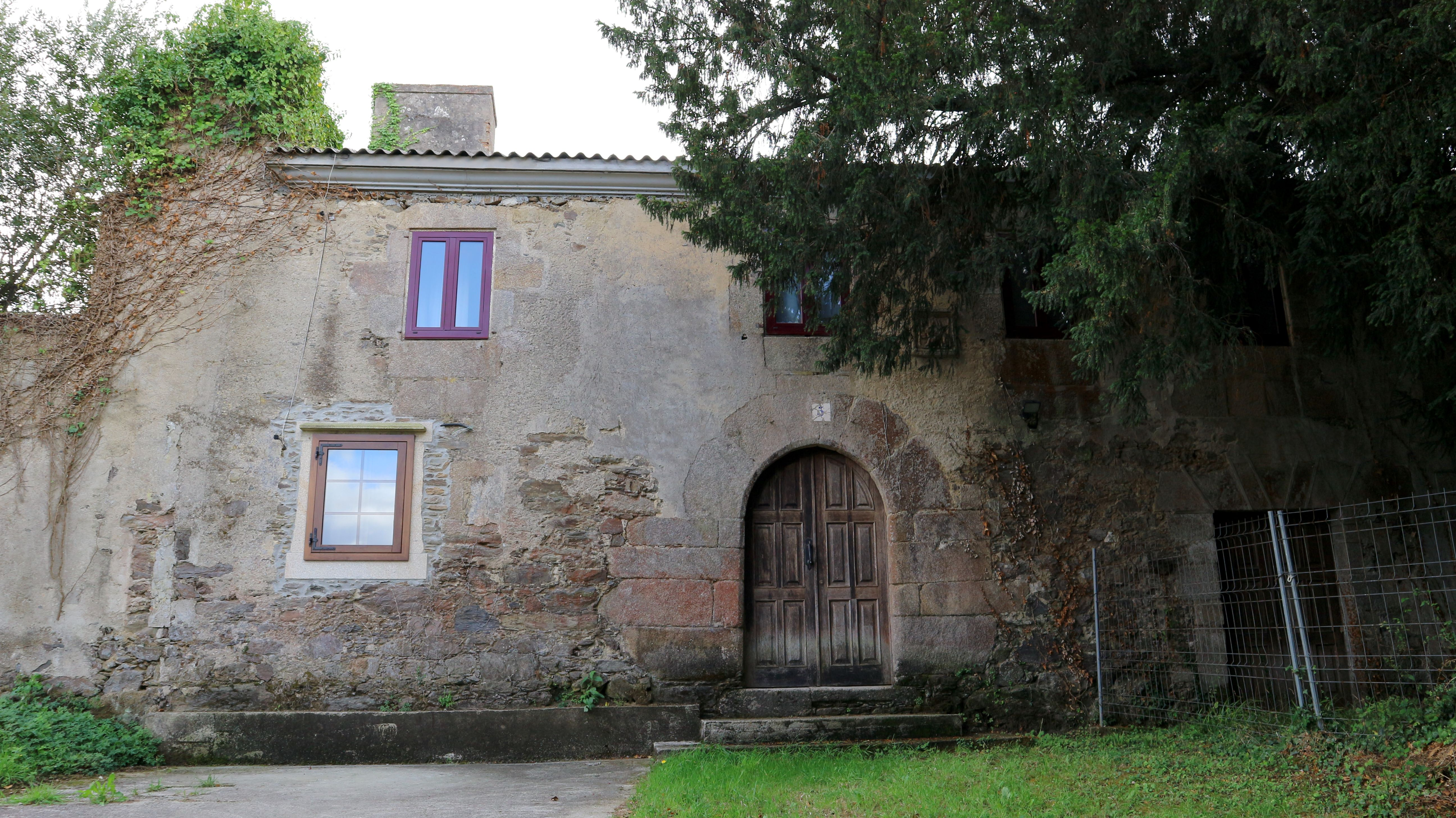 Torre Peito de Bordel, en Bordel, Sarandós, Abegondo.